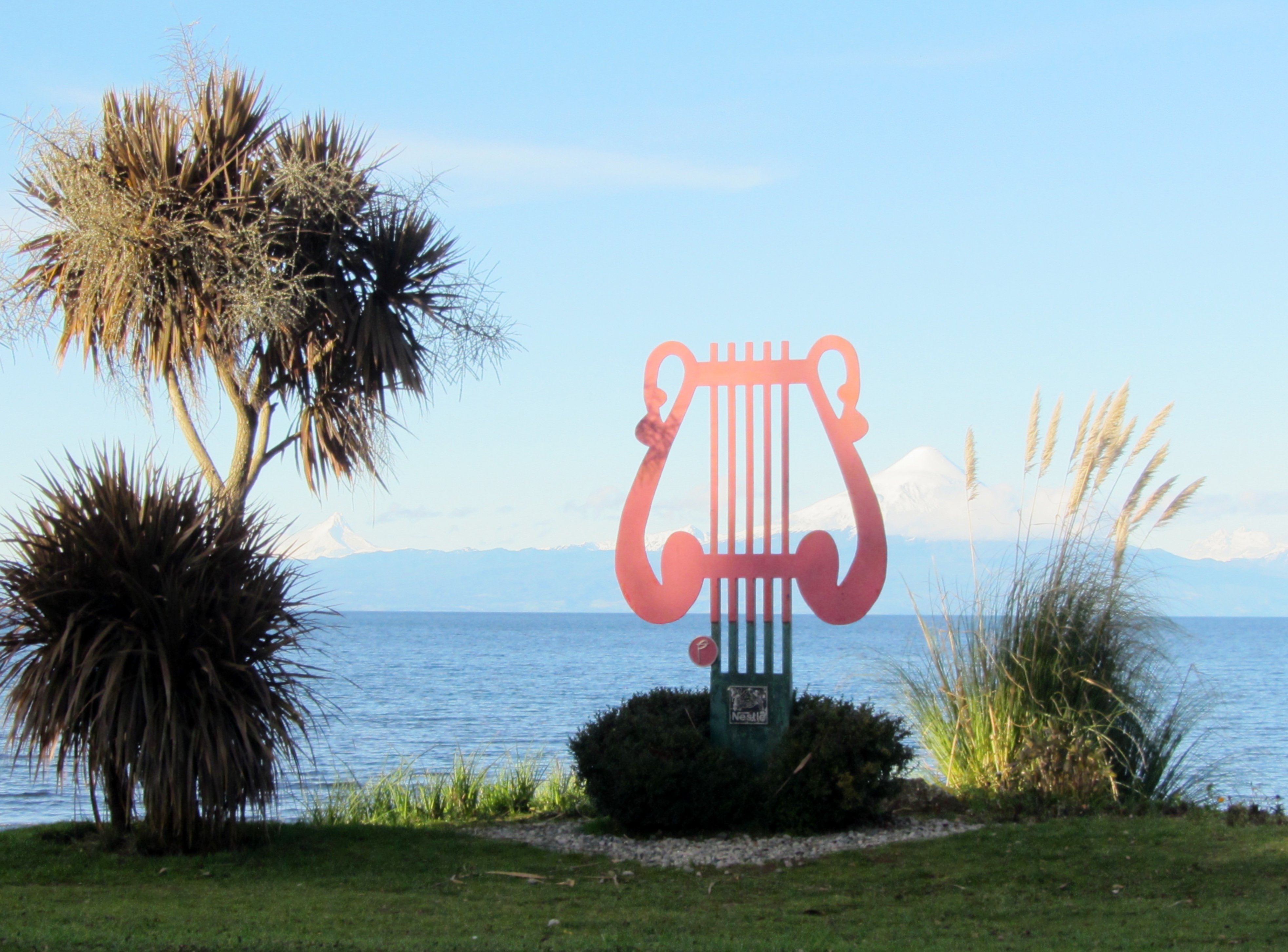 Escultura de una lira a orillas del lago Llanquihue en Frutillar, Chile, teniendo como fondo los volcanes Puntiagudo y Osorno.